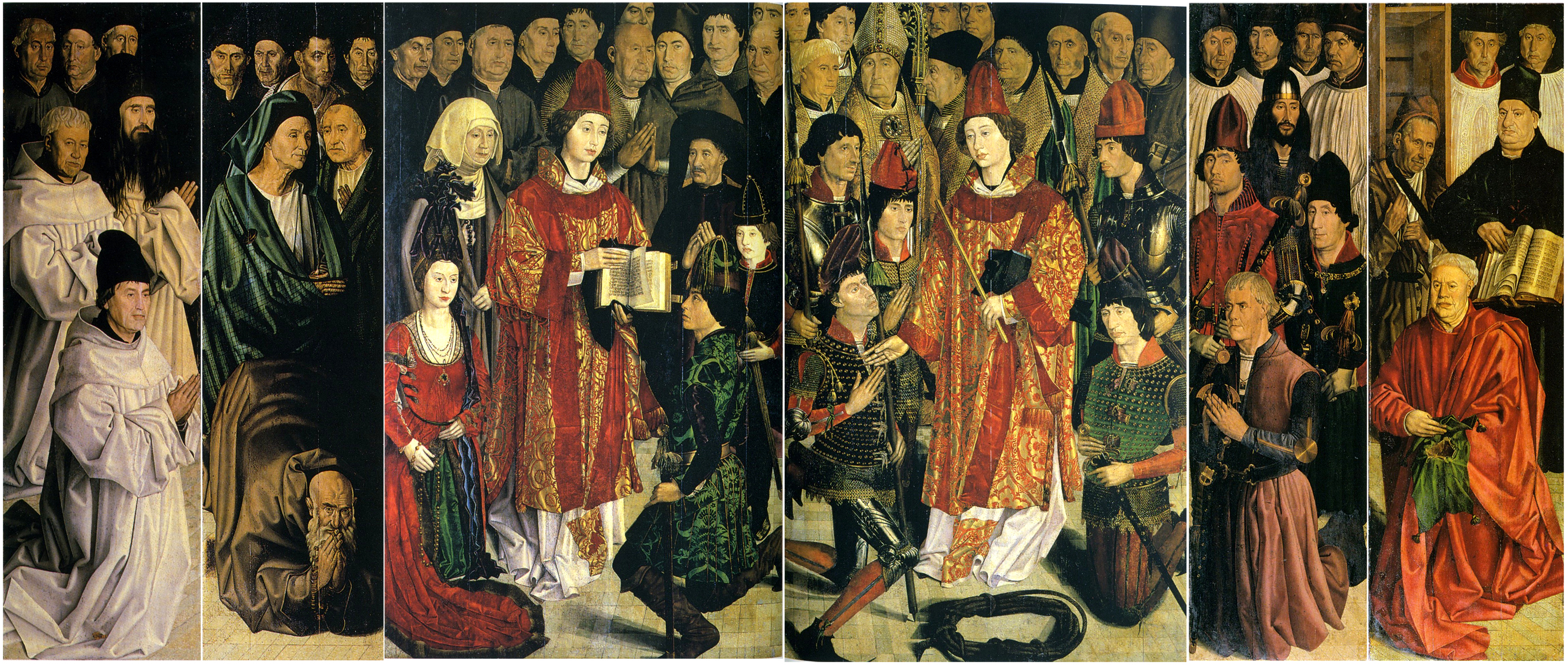 Triptyque de Saint-Vincent